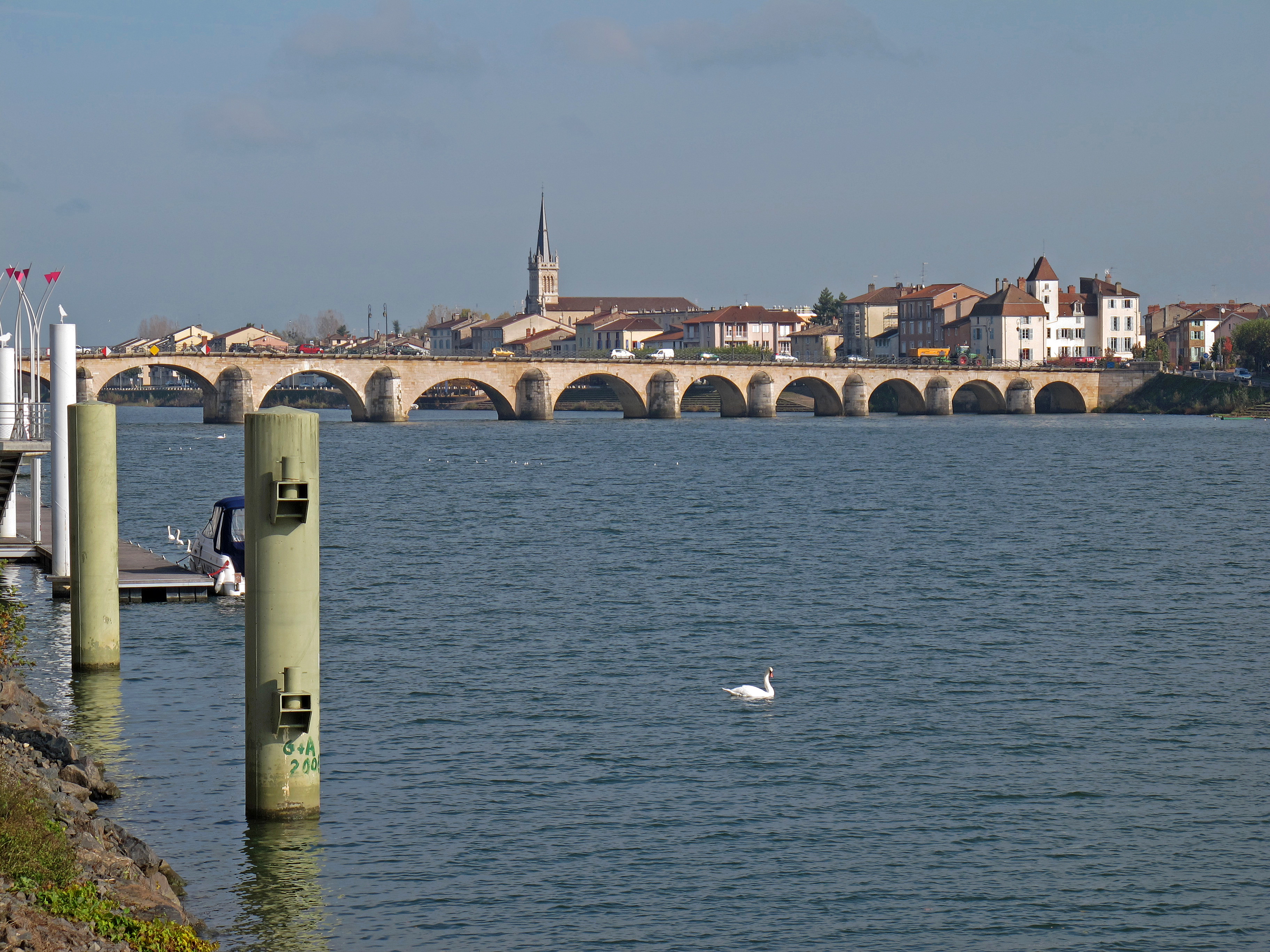 Le vieux pont Saint-Laurent franchit la Saône entre la ville de Mâcon et Saint-Laurent sur Saône situé sur l'autre berge, dans le département de l'Ain. D'après le premier ouvrage, son établissement ne serait pas antérieur au XIème siècle, bien que certaines rumeurs l'attribuent à César. Le deuxième émet l'hypothèse que ce pont fut établi par Othon, comte de Macon et d'Auxonne ou par son fils Geoffroy, aaussi au XIème siècle. Il comporte, depuis 1550 semble-t-il, 12 arches. Il fût donc fortifié au XVIe siècle, puis refait en 1772 et en 1843. Le pont Saint-Laurent (XIVe siècle# a été l'objet de nombreuses réparations à cause des crues de la Saône. Il est élargi en 1772 et gagne de nouvelles arches. Les mâconnais s'opposent à sa démolition pour permettre la navigation. Un canal de dérivation est créé dans les années 1980. Mâcon conserve son pont Saint-Laurent,qui est classé monument historique. Pont Saint-Laurent The Saint-Laurent #fourteenth century# was the subject of many repairs due to the floods of the Saône. It expanded in 1772 and won new arches. The people of Mâcon oppose its demolition to allow navigation. A diversion channel is created in the 1980s. Mâcon retains Pont Saint-Laurent, which is a historical monument.